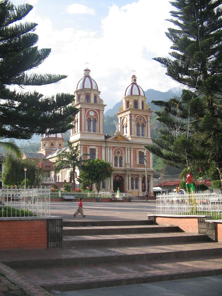 Parque principal de Cajamarca Tolima (fotografía tomada por Víctor Hewitt)